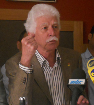 Pierre Bérenger le 26 mars 2011 à sa conférence de presse hebdomadaire